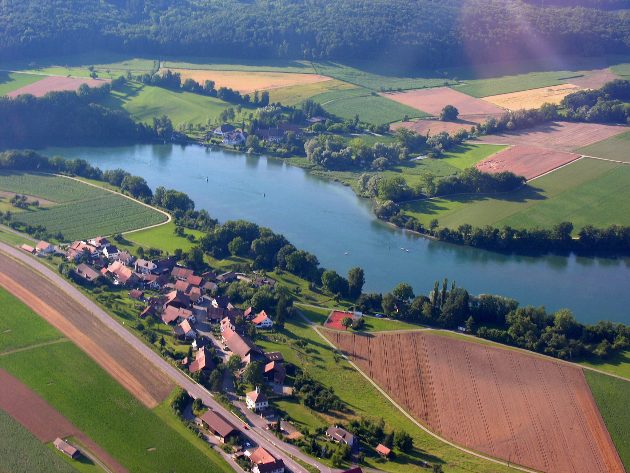 Aerial View of Rheinklingen and Bibermühle